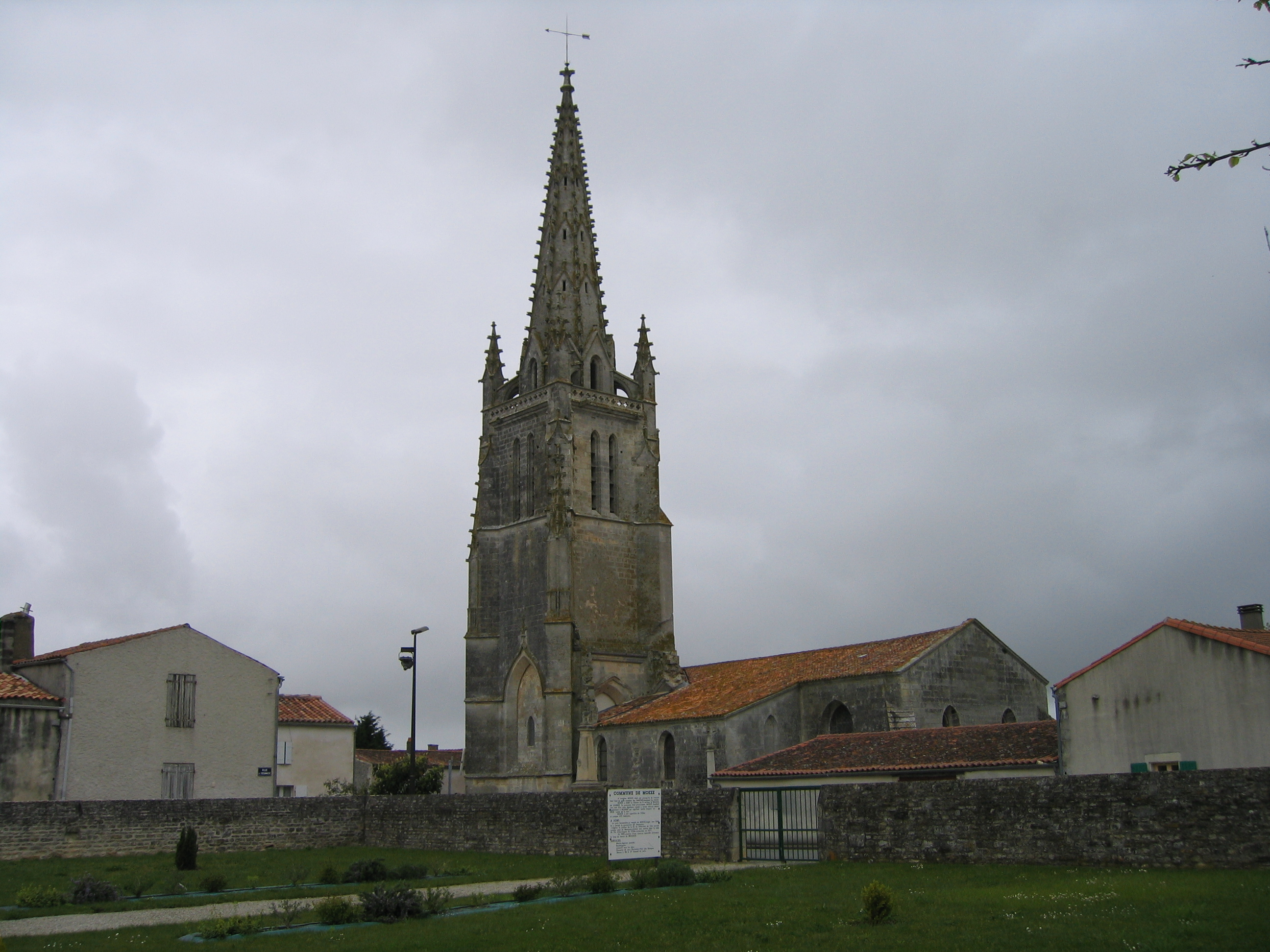 L'église de Moëze